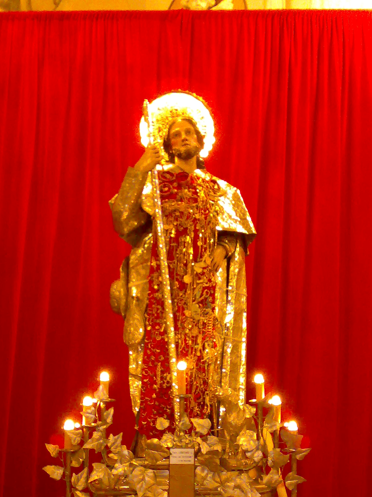 Noicattaro, simluacro di San Rocco, patrono della cittadina, ornato con ex voto.